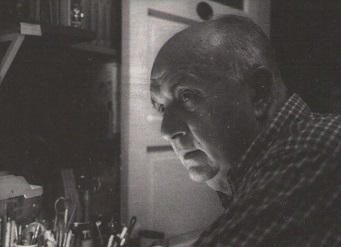 Juan Zanotto en su estudio